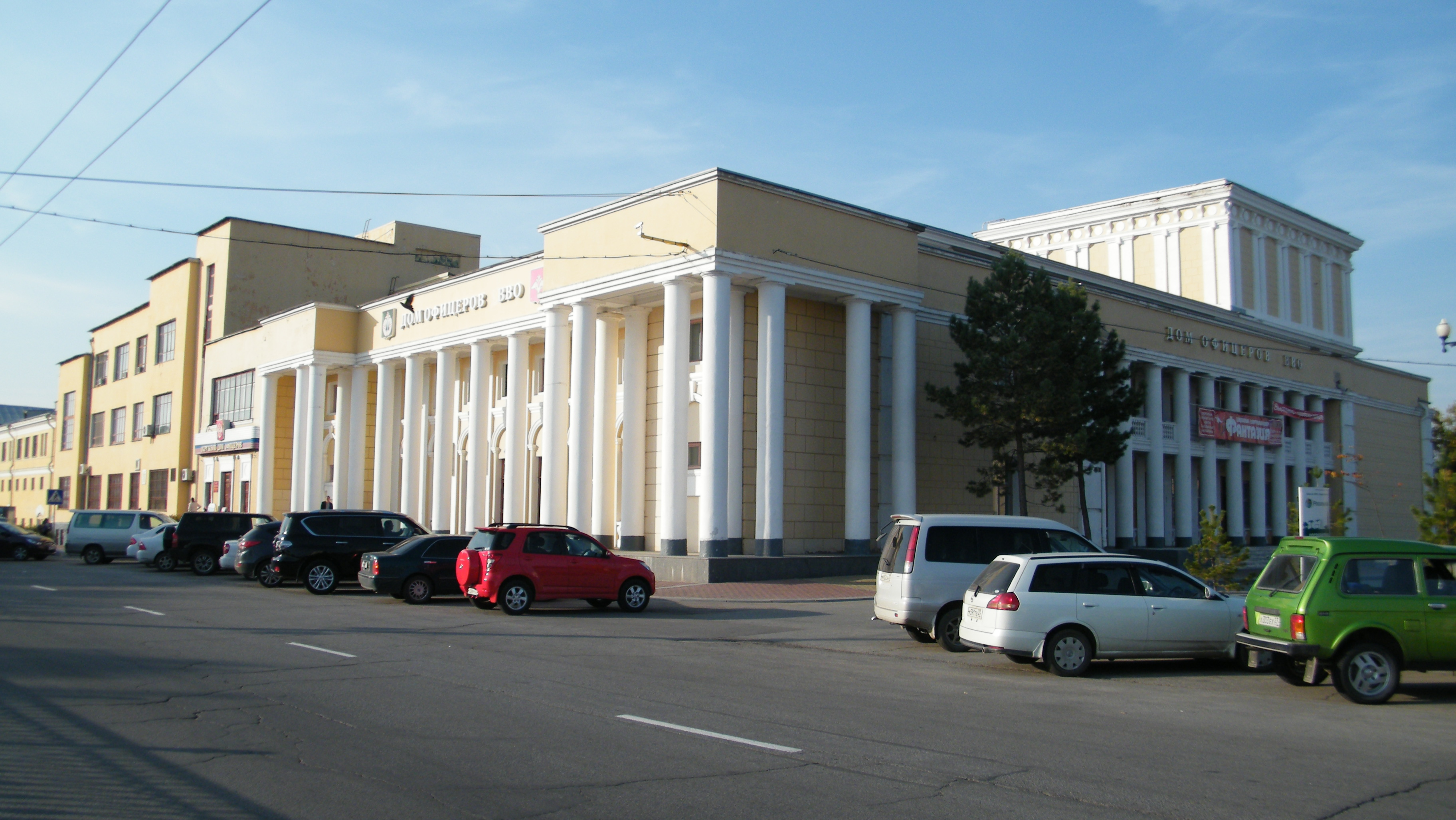 Хабаровск Дом офицеров